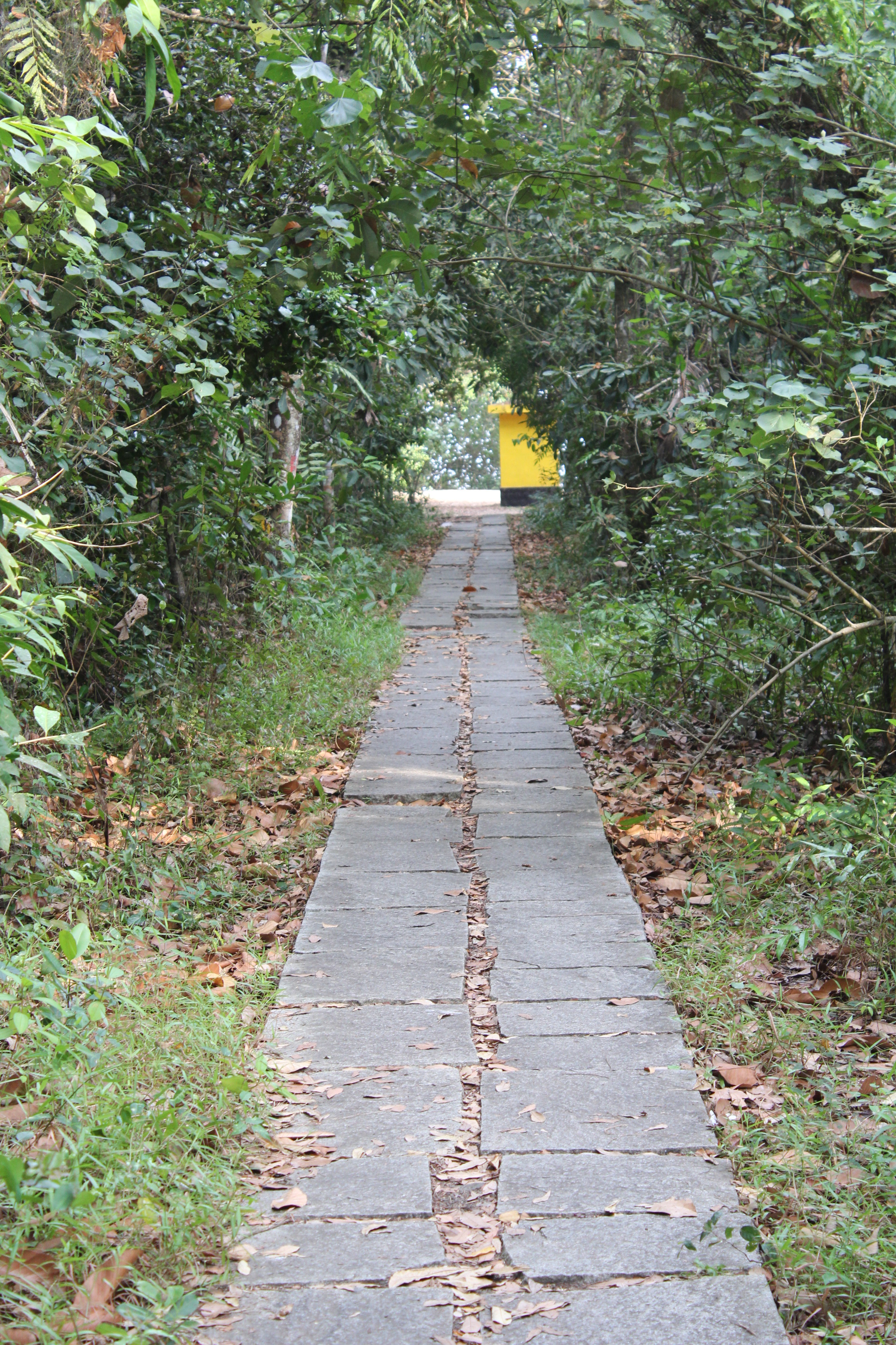 വേമ്പനാട്ടുകായലില്‍ പാതിരാമണല്‍ ദ്വീപിലെ നടപ്പാത